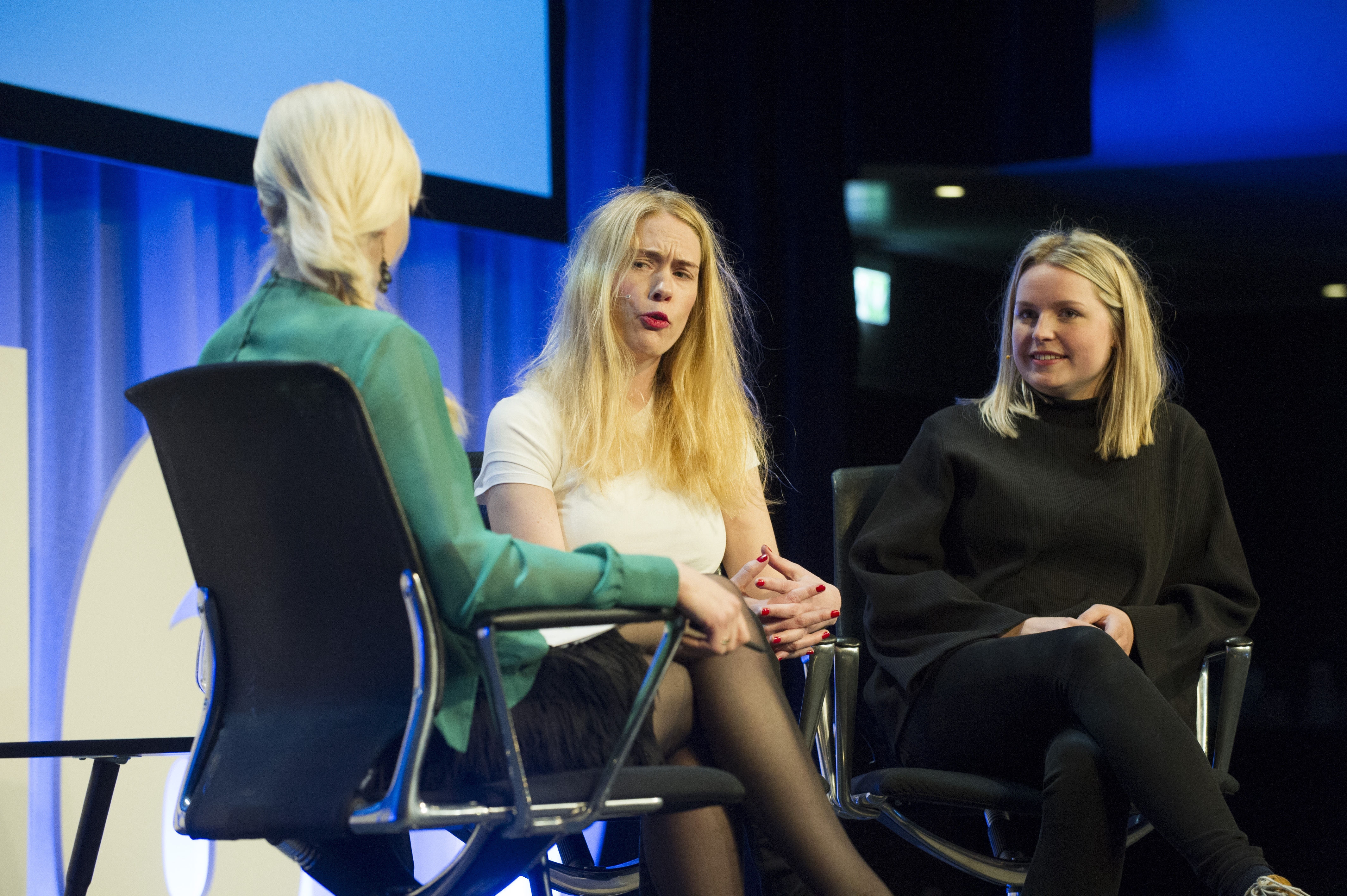 Medvirkende: Julie Andem, Mari Magnus Moderator Marte Spurkland